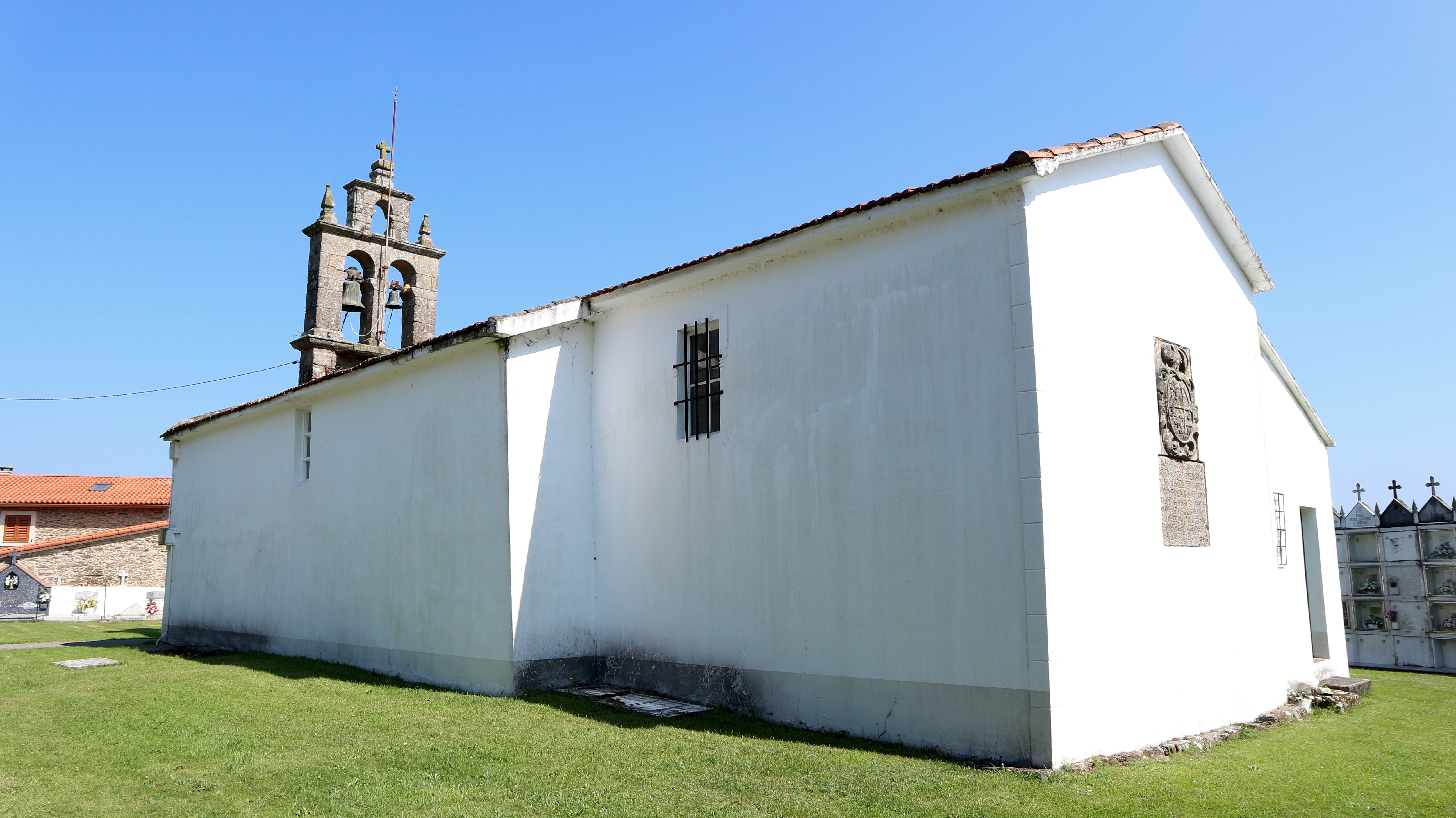 Igrexa de San Lourenzo de Olas. Olas, Mesía.